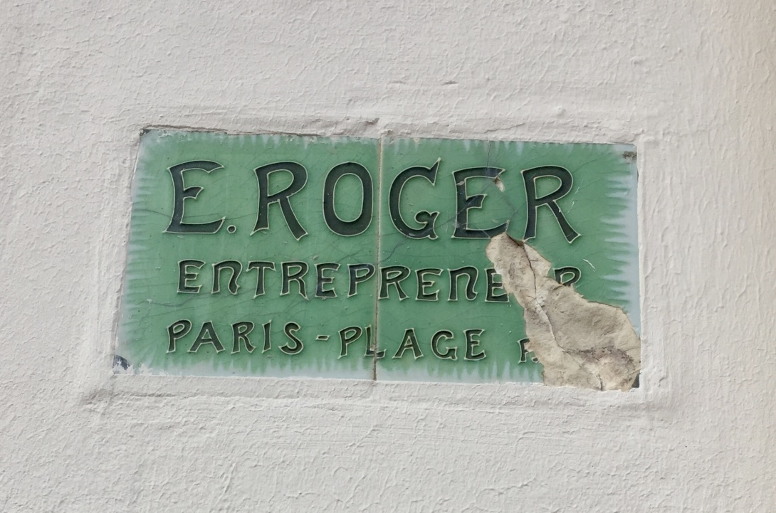 plaque apposée sur le bâtiment nouvellement construit.